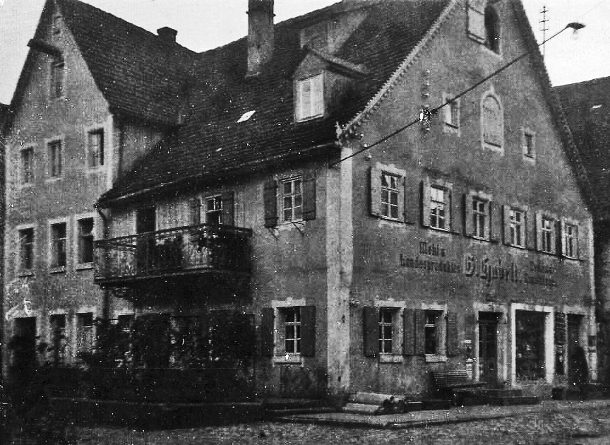 Foto vom Haus am Markt